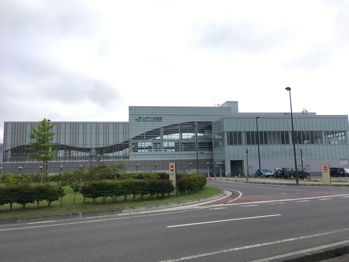 七戸十和田駅北口駅舎